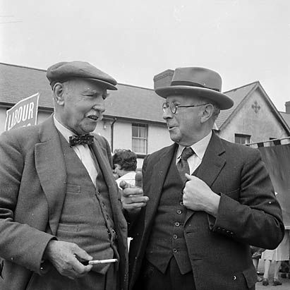 Teitl Cymraeg/Welsh title: T. E. Nicholas a D. J. Williams yn sgwrsio yn rali CND yn Aberystwyth Ffotograffydd/Photographer: Geoff Charles (1909-2002) Dyddiad/Date: May 25, 1961. Cyfrwng/Medium: Negydd ffilm / Film negative Cyfeiriad/Reference: (gch14723) Rhif cofnod / Record no.: 3376444 Rhagor o wybodaeth am gasgliad Geoff Charles yn Llyfrgell Genedlaethol Cymru More information about the Geoff Charles Collection at the National Library of Wales